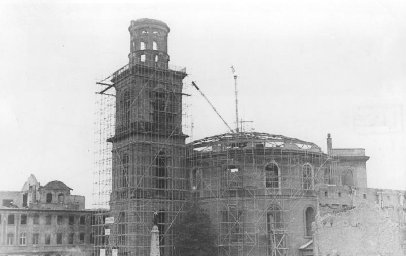 Wiederaufbau der Paulskirche in Frankfurt/Main 1947 Bild zeigt: Eine Uebersicht der Paulskirche während der Wiederaufbauarbeiten. Foto: EDU-Illus/Dumm 993-47